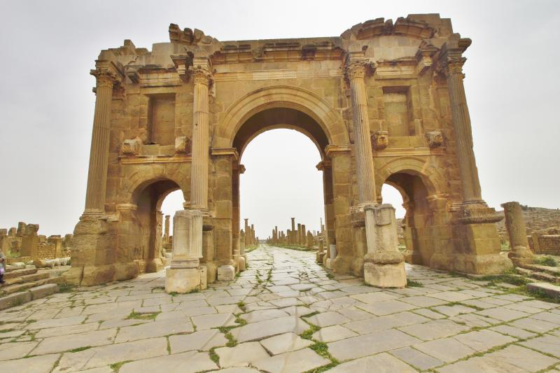 Arc de Trajan